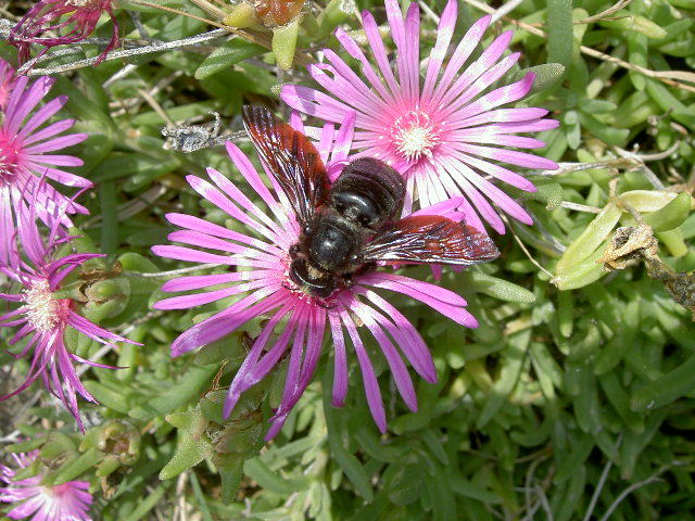 Grande espèce d'hyménoptère semblant solitaire (France, août 2006). Vraisemblablement Xylocopa violacea (abeille charpentière). Photographie personnelle. GPL.